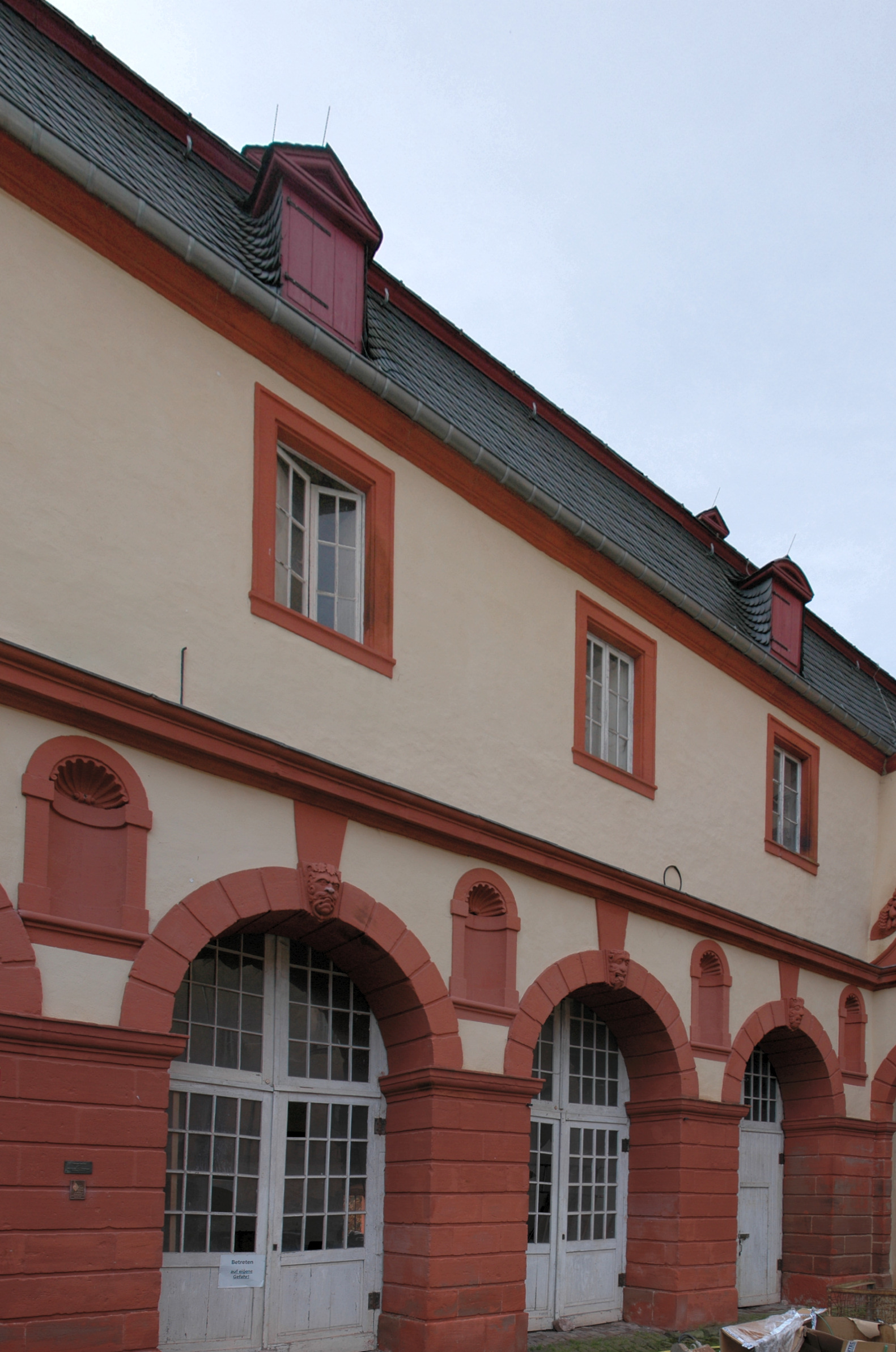 Schloss Malberg, Arkadenbau